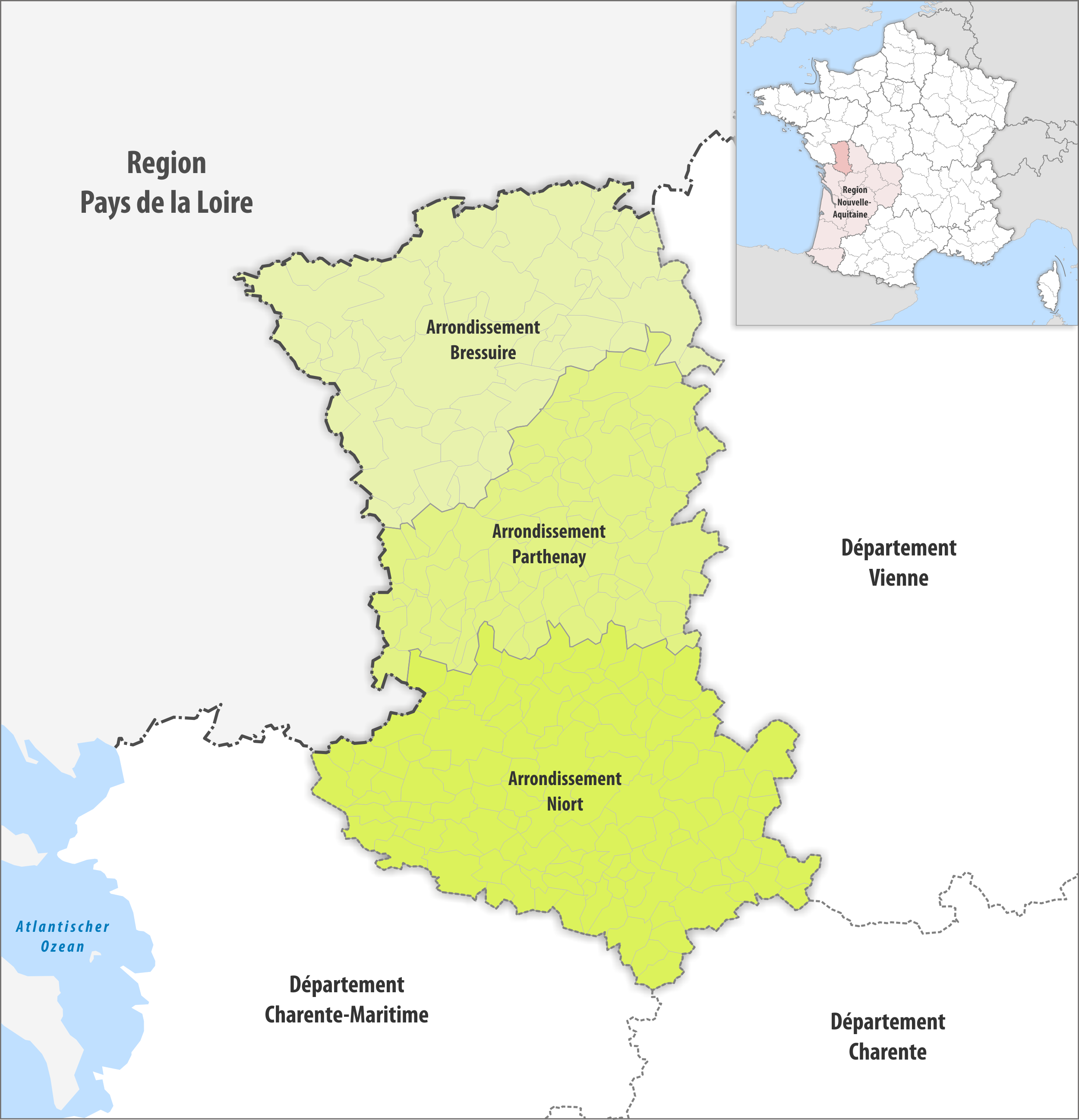 Gemeinden und Arrondissemente im Departement Deux-Sèvres